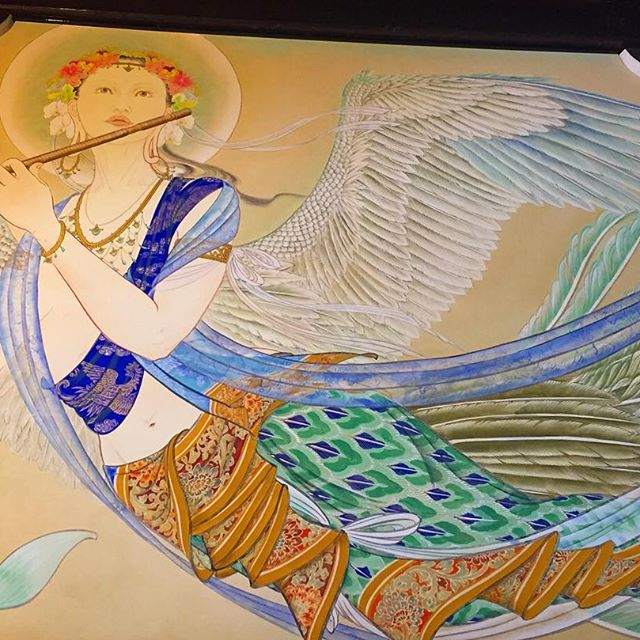 仏画師によって描かれる